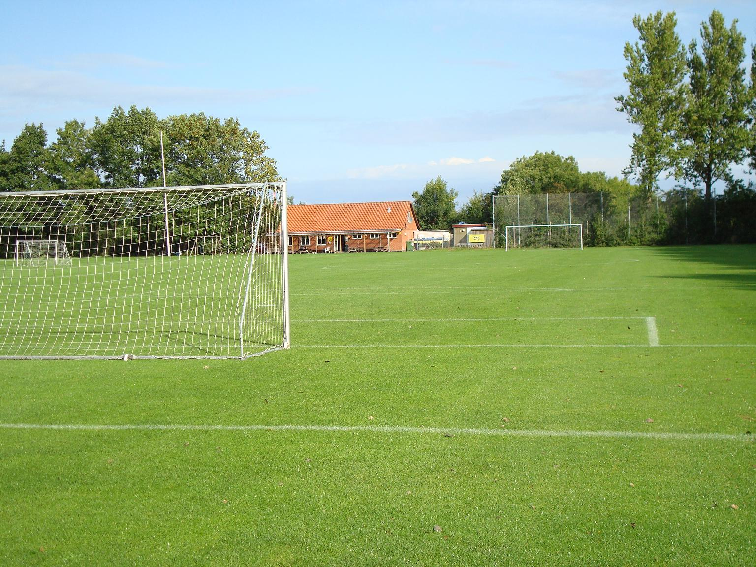 Klubhus på Tuse Næs Stadion, Udby Kirkevej 27 4300 Holbæk